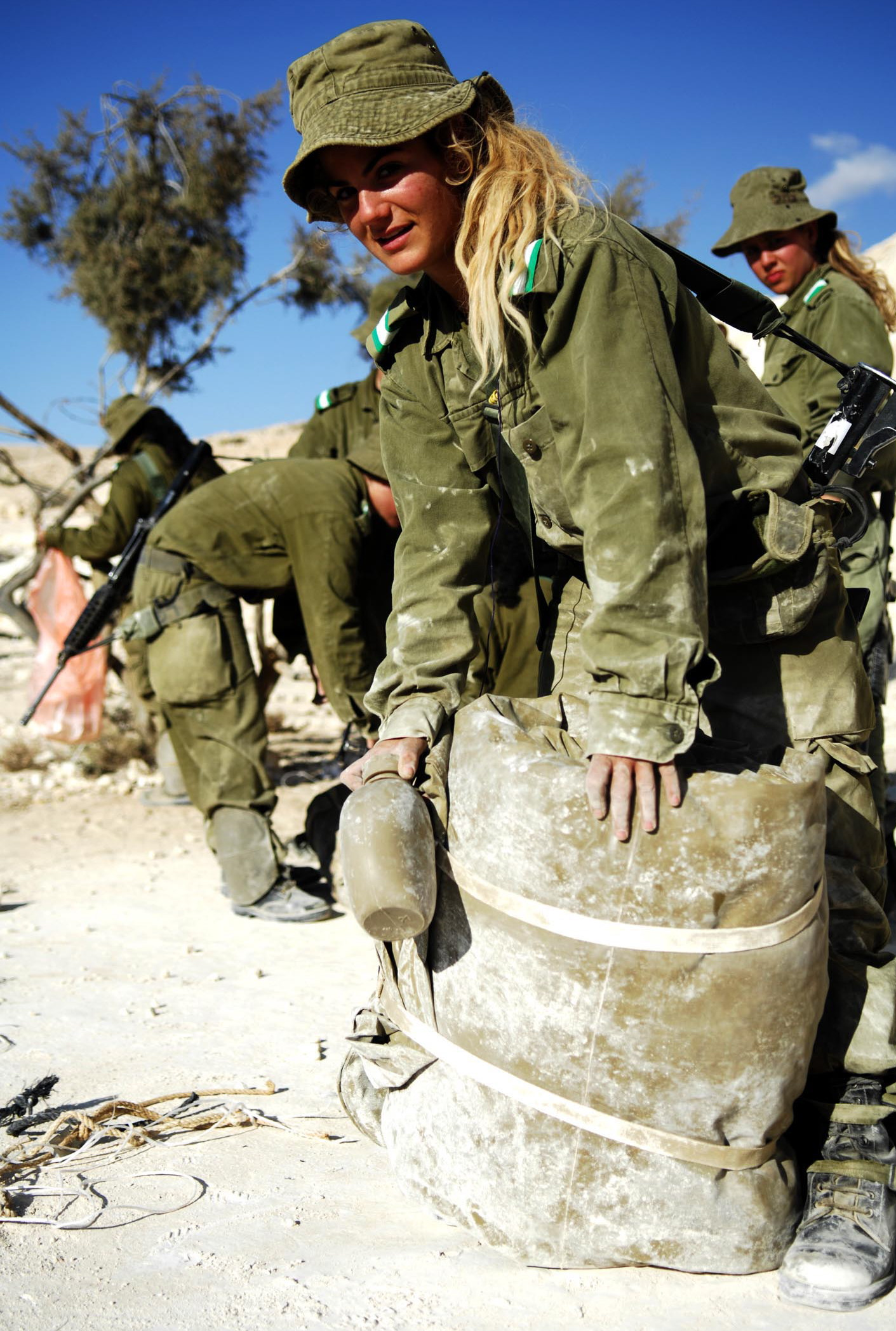 December 5, 2006. The Field Training Week in Southern Israel, part of the IDF Infantry Instructors course, includes individual and group drills, navigation practice, sleeping in the field and camouflage training. At the end of the course the female soldiers will be placed in different positions, instructing IDF Ground Forces. שבוע אימוני שדה הדרום הארץ מהווה חלק מקורס מדריכות חי"ר, וכולל תרגילי יחיד וקבוצה, אימוני ניווט, שינה והסוואה בשטח ועוד. בסוף הקורס מוצבות בתפקידים שונים כמדריכות בזרוע היבשה.